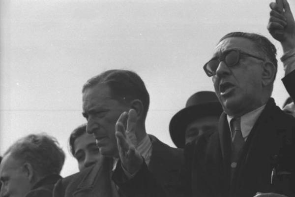 Palermo. Aeroporto di Punta Raisi. Andrea Finocchiaro Aprile parla alla folla.